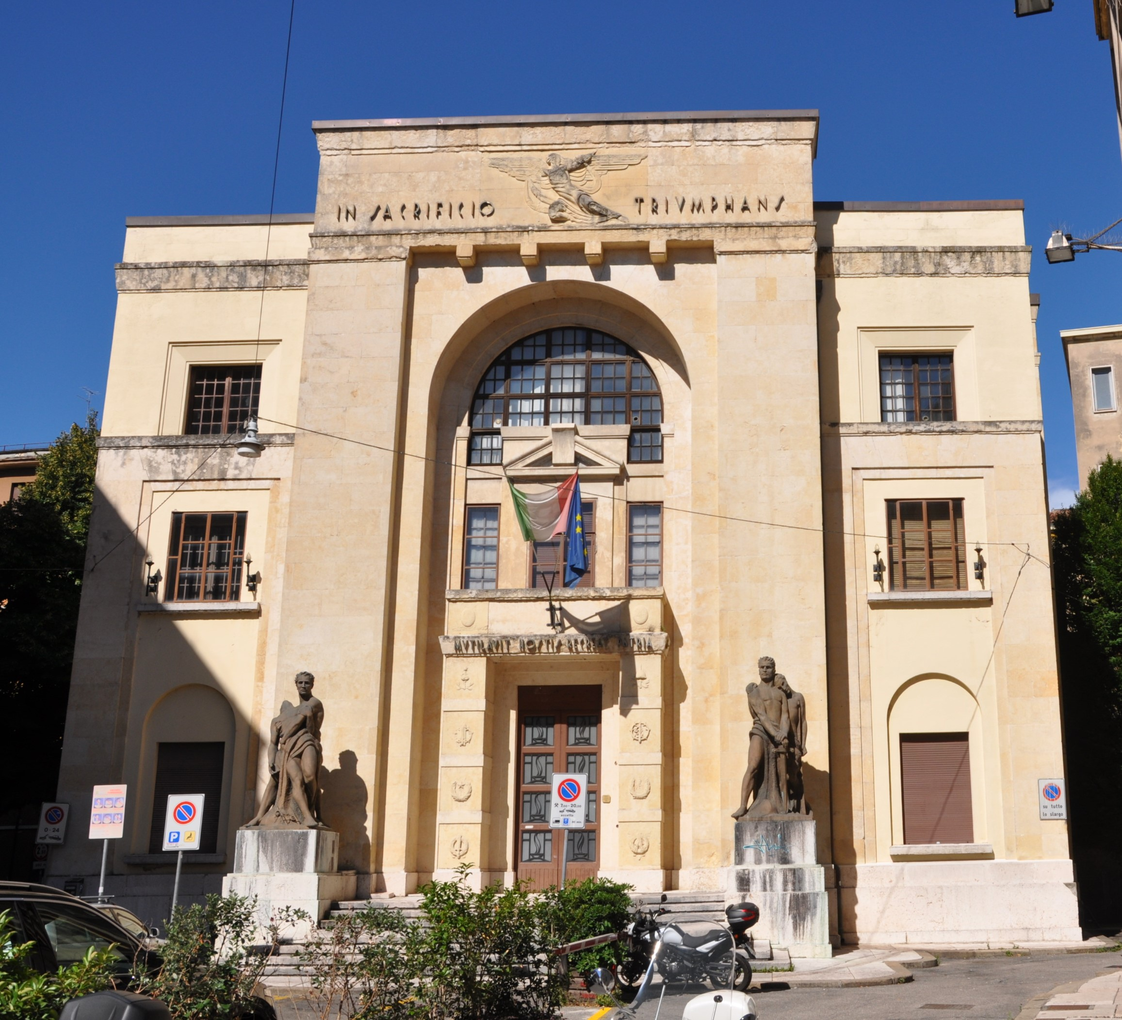 Casa del Mutilato. Palazzo edificato per ricordare tutti i soldati feriti durante la Prima Guerra mondiale. This is a photo of a monument which is part of cultural heritage of Italy.